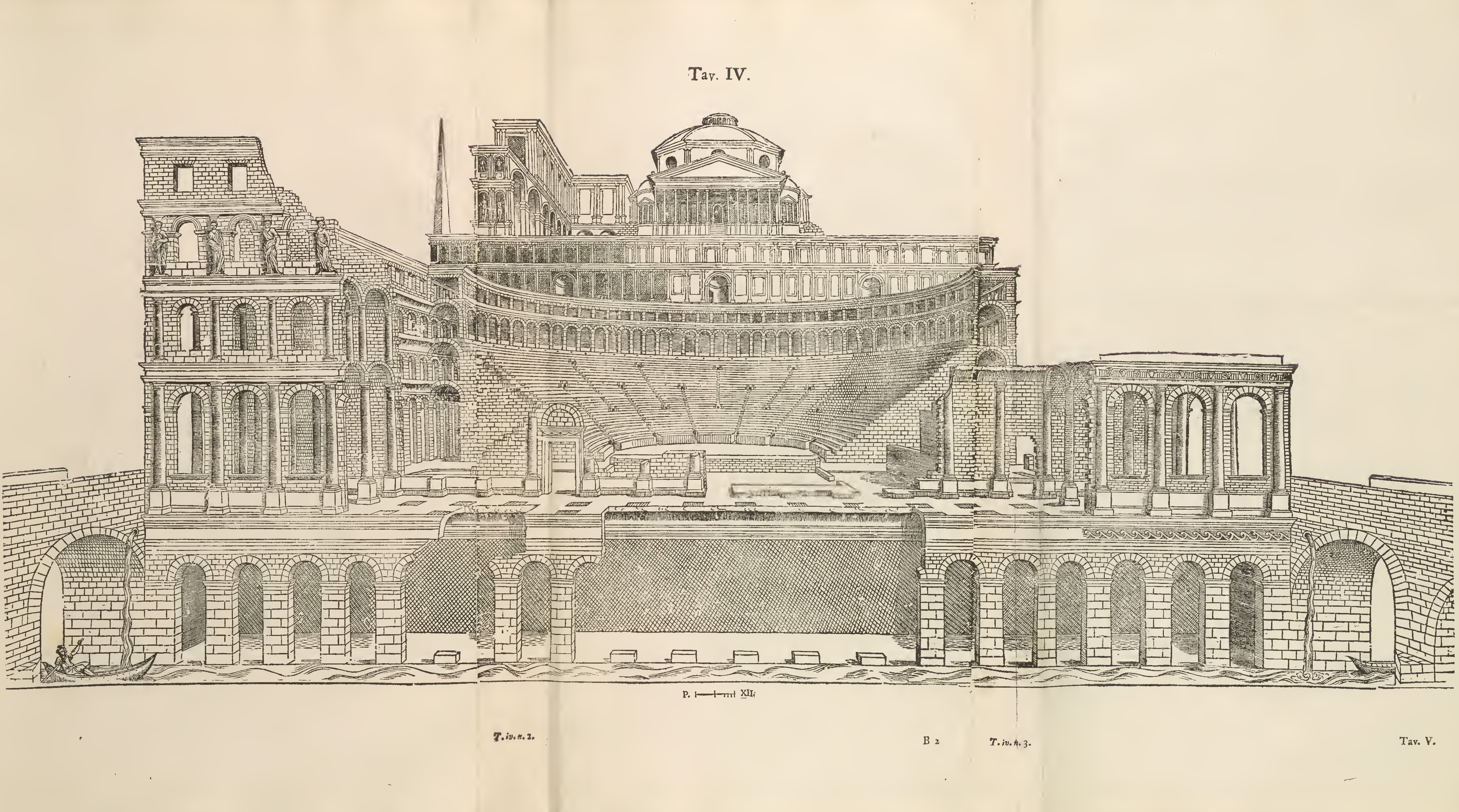 Esploso assonometrico del teatro romano di Verona, di cui si possono vedere parte della facciata principale, cavea, terrazze scenografiche e tempio in cima alla collina.